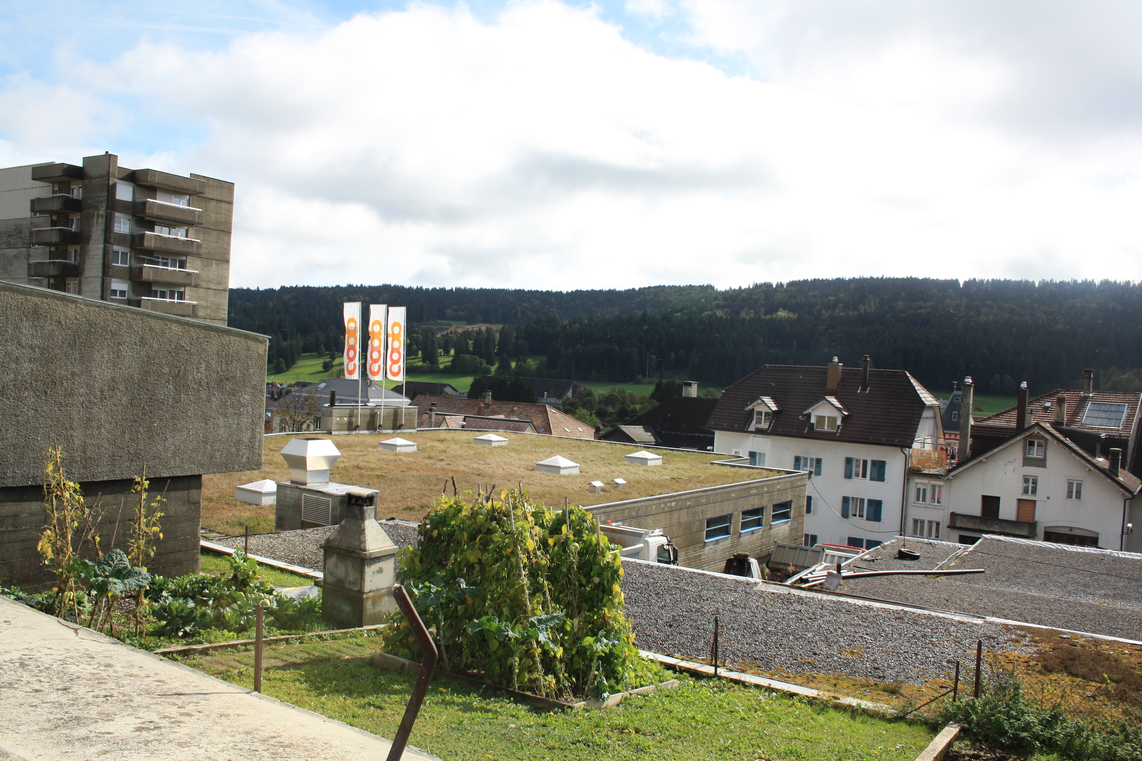 COOP in Tramelan